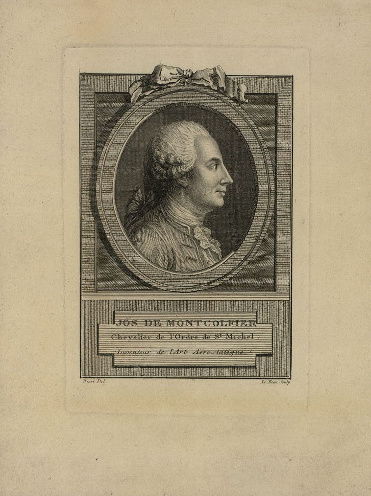 Jos. de Montgolfier, chevalier de l'ordre de St. Michel, inventeur de l'art aerostatique / Binet, del., ; Le Beau, sculp.